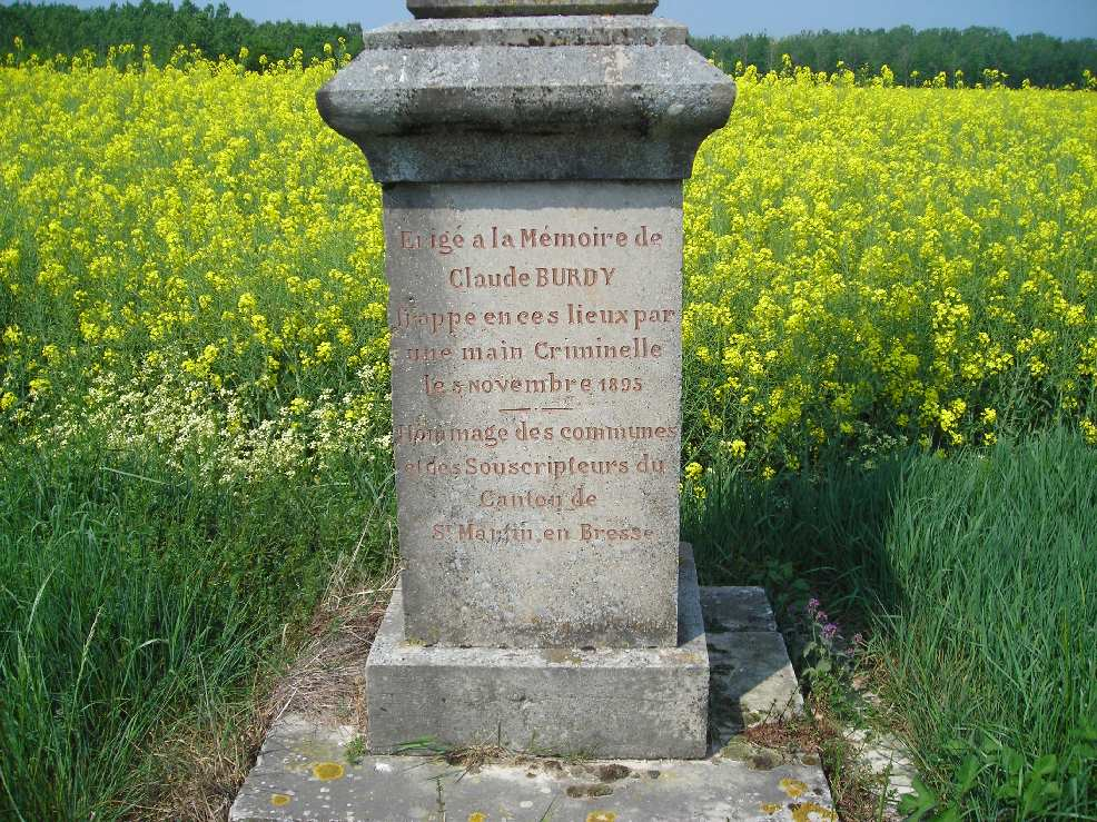 Monument Claude Burdy Guerfand Vue Inscriptions